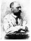 Ferdinand Blumentritt,lecturer